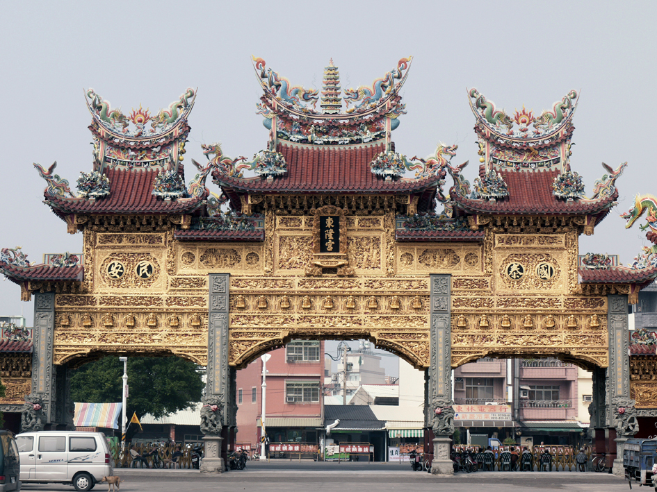 中文（台灣）: 東港東隆宮